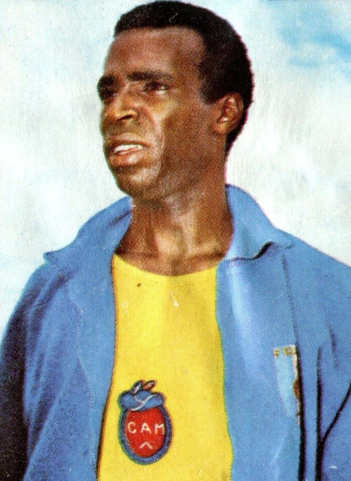 CAMPIONI DELLO SPORT 1969/70 Figurina-Sticker n. 15 -R. BAMBUCK